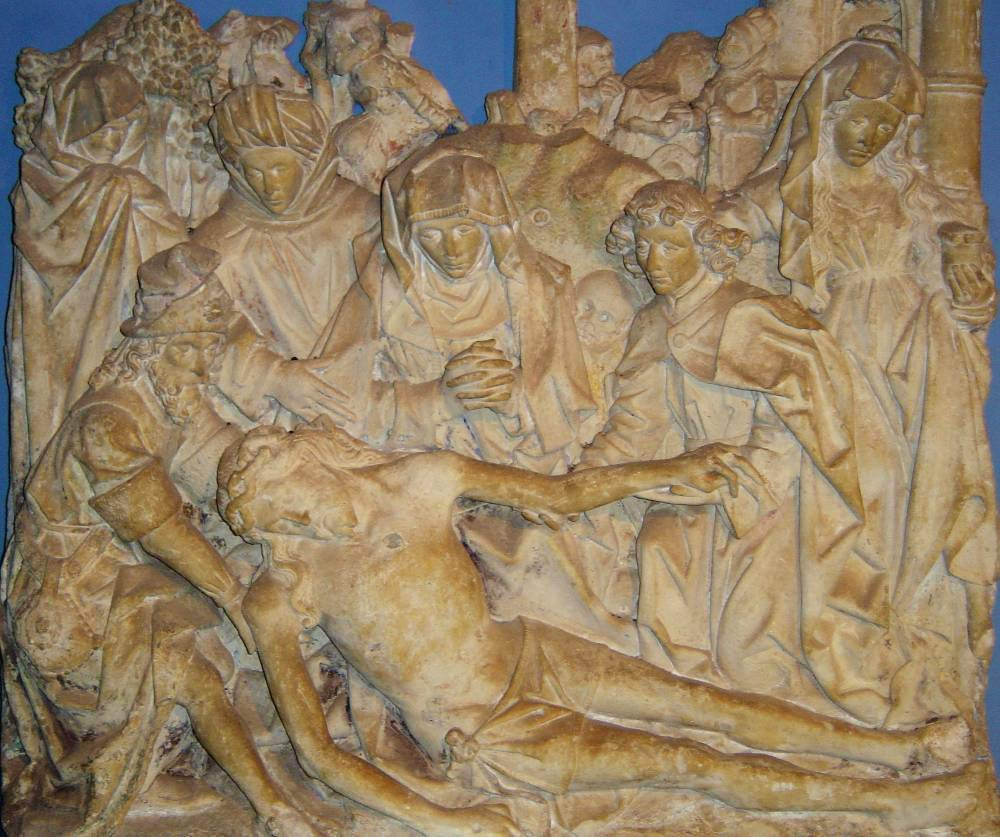 sculpture du château_de_Castelnau-Bretenoux.